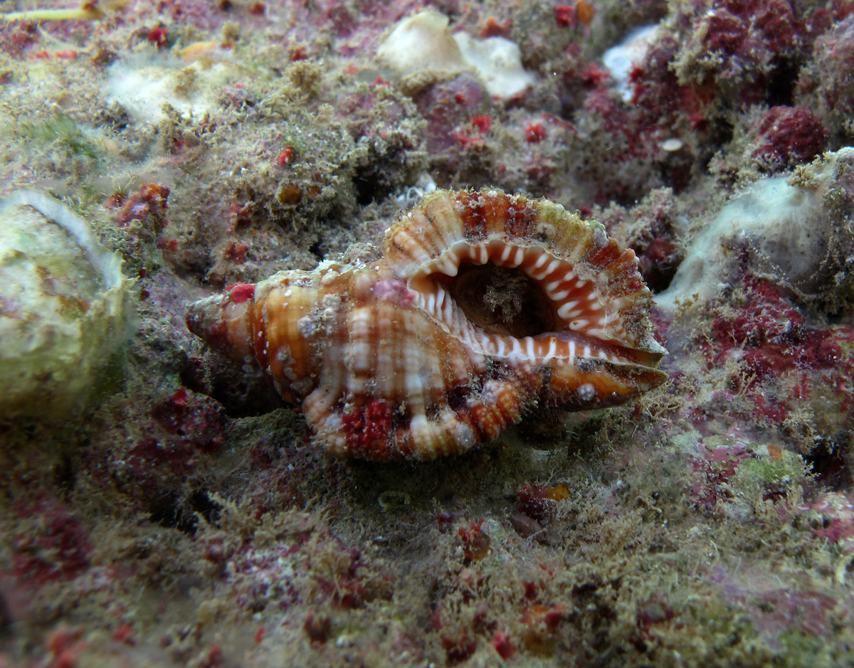 Un Monoplex aquatilis à la Réunion.